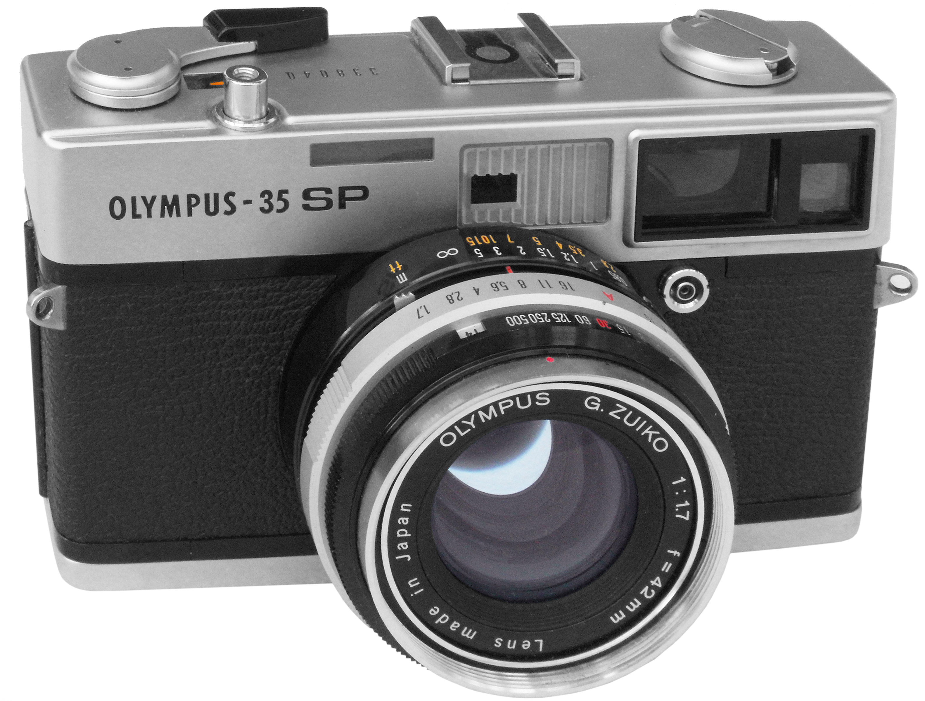 Entweder voll automatisch oder voll manuell: Dazwischen gibt es nichts bei dieser exzellenten Kompakt-Sucherkamera mit gekuppeltem Entfernungsmesser. Das bedeutet: Blenden- und Zeitenring auf „A“ stellen, die Automatik sucht sich die beste Zeit-Blenden-Kombination selbst aus. Will man die Belichtungswerte selber bestimmen, muss sowohl Zeitring als auch Blendenskala auf einen Zahlenwert fixiert sein. Bei manuellem Betrieb wird trotzdem die Belichtung gemessen, sie wird als Lichtwert im Sucher angezeigt und man muss danach Blende und Zeit mit Hand einstellen. Der manuelle Modus funktioniert auch ohne Batterie, so dass die Kamera - bei einiger Erfahrung - eigentlich immer einsatzbereit ist. Das ist sehr hilfreich, weil die passende 625er Quecksilber-Zelle ja offiziell nicht mehr erhältlich ist und man so sogar auf Ersatz verzichten kann. Ist der Belichtungsmesser aber noch in Betrieb (er befindet sich neben dem Sucher), kann man bei kontrastreichen Motiven sogar von Integral- auf Spotmessung umschalten. Dieses Ausstattungsmerkmal war damals ebenso selten in der Kompakt-Klasse wie das Objektiv: das G. Zuiko 1:1,7/42 mm ist eine 7-Linsen-Konstruktion und damit vielleicht sogar das aufwendigste Objektiv in dieser Kategorie. Obwohl bei meinem Exemplar der Belichtungsmesser nicht mehr geht, kann man einwandfrei damit arbeiten: der Verschluss (ein Seiko-FLA) arbeitet noch sehr genau - 1 Sekunde ist wirklich noch 1 Sekunde. Sowieso macht die Kamera einen äußerst robusten Eindruck und man hat das Gefühl von bester Verarbeitung. Produktionszeitraum: 1969 bis 1975. Einfacher ausgestattet, dafür aber wesentlich kompakter, ist die Olympus 35 RC.